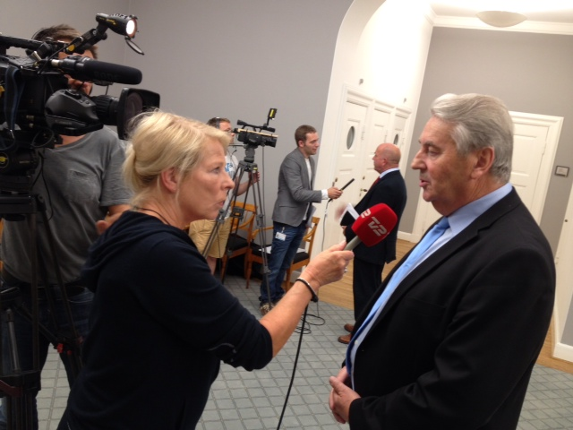 MF Edmund Joensen fra det social-liberale færøske Sambandspartiet interviewes af TV2-journalist Gunilla Roijer efter et samråd i Folketingets Europaudvalg